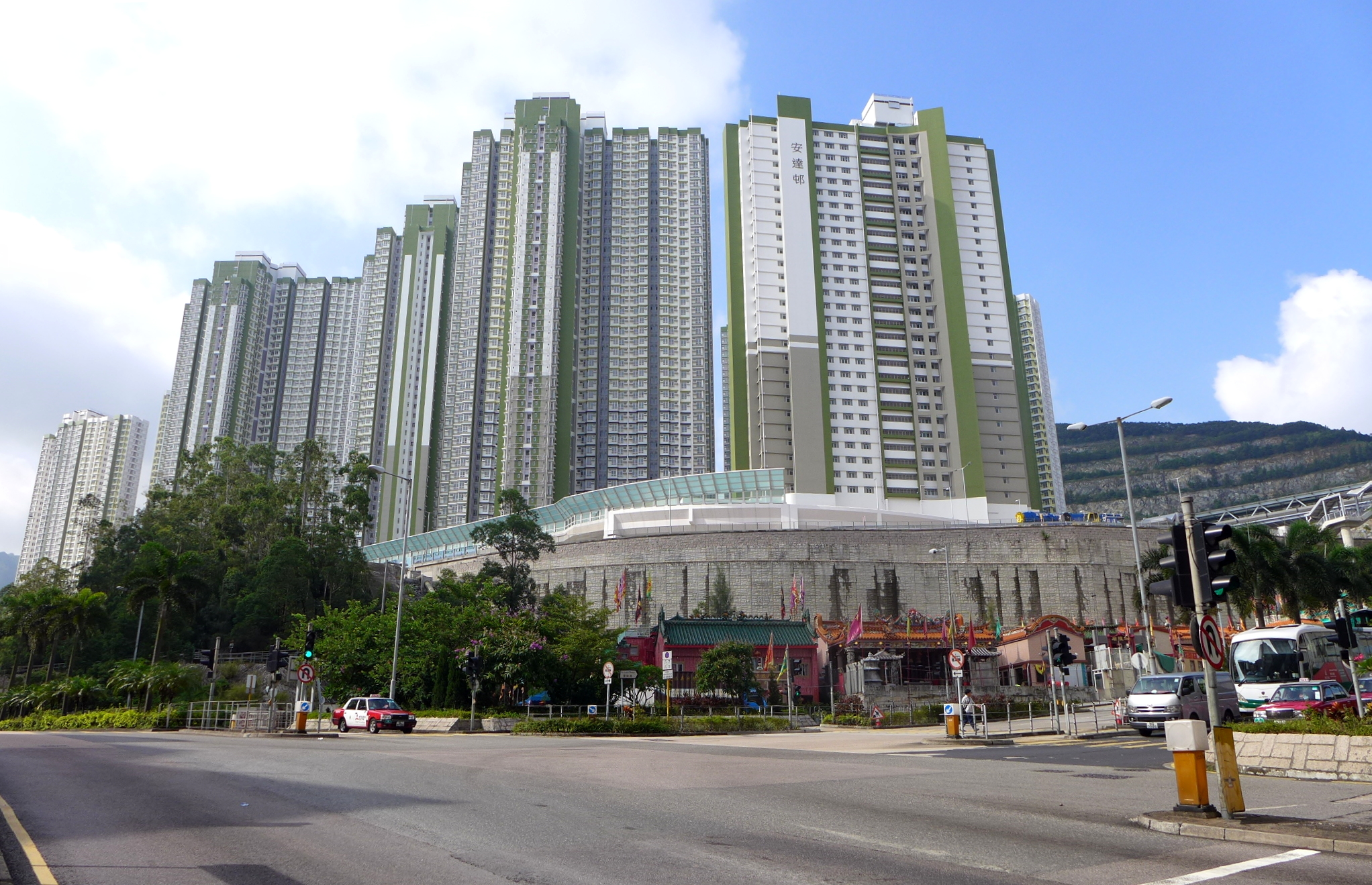 On Tat Estate